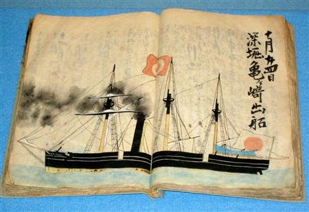 長崎市歴史民族資料館で展示中の冊子に、いろは丸の絵があったと発表。共同通信。Nagasaki,japan(長崎県長崎市)で撮影。いろは丸の絵